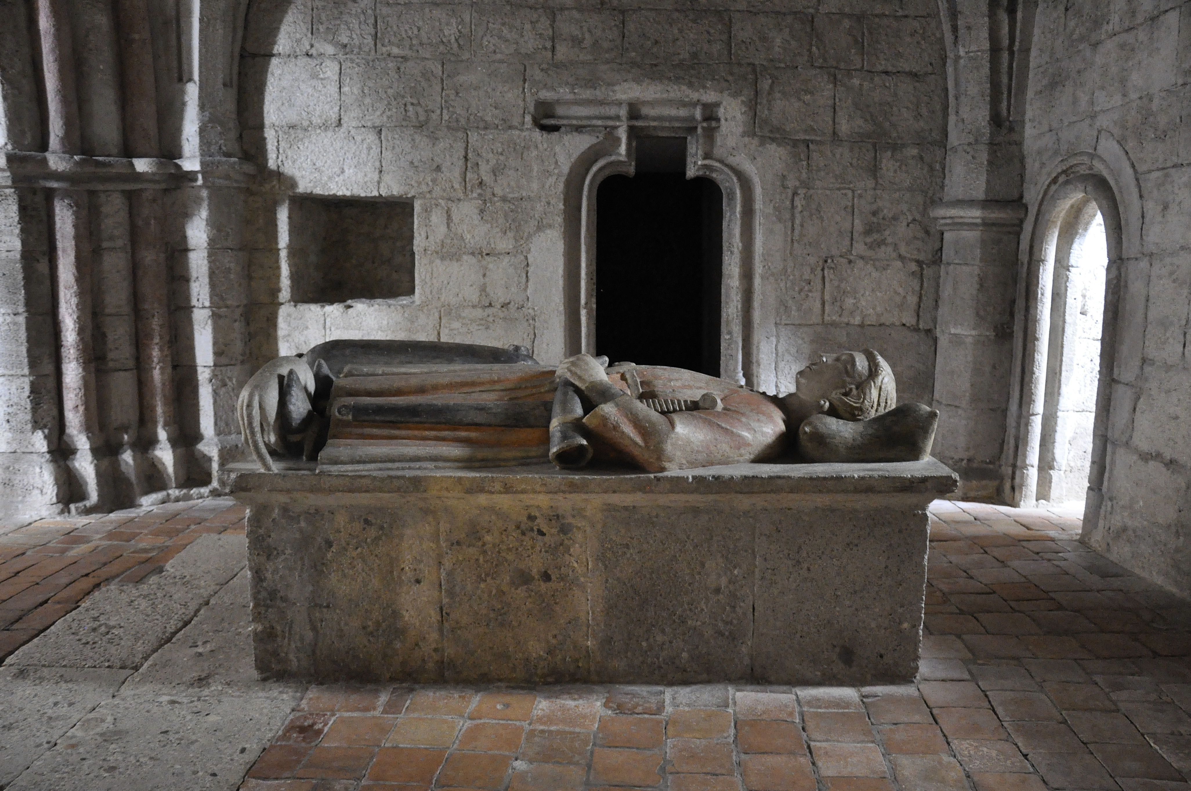 Das Hochgrab Gunthers. Der Legende nach Sohn von Herzog Tassilo, dem Gründer des Stiftes Kremsmünster